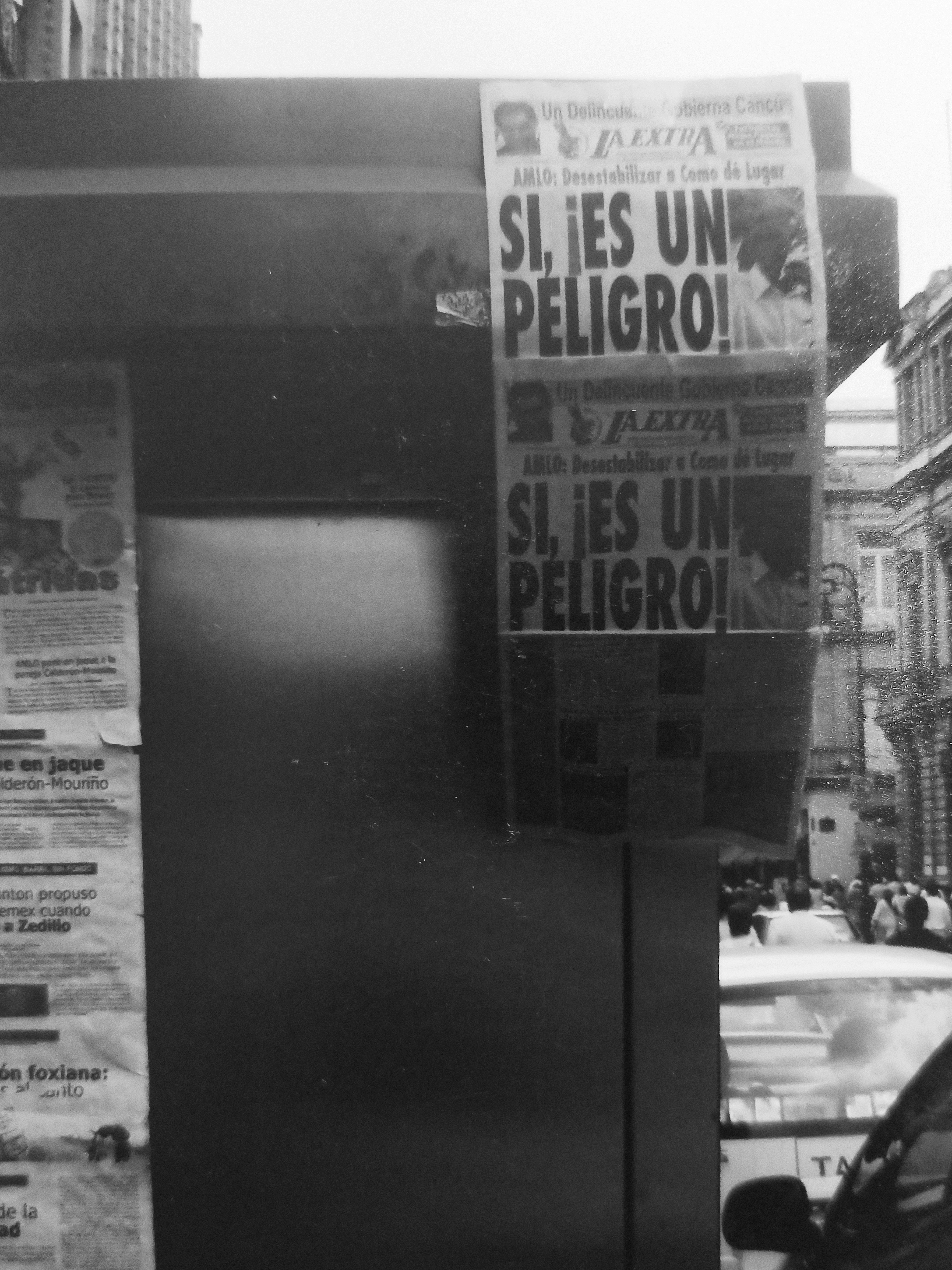 «Sí, ¡Es un peligro! AMLO: Desestabilizar a como dé lugar» - Ciudad de México, 2008. Primera plana de periódico «La Extra» sobre las protestas de Andrés Manuel López Obrador en contra de reforma energética del presidente Felipe Calderón Hinojosa.